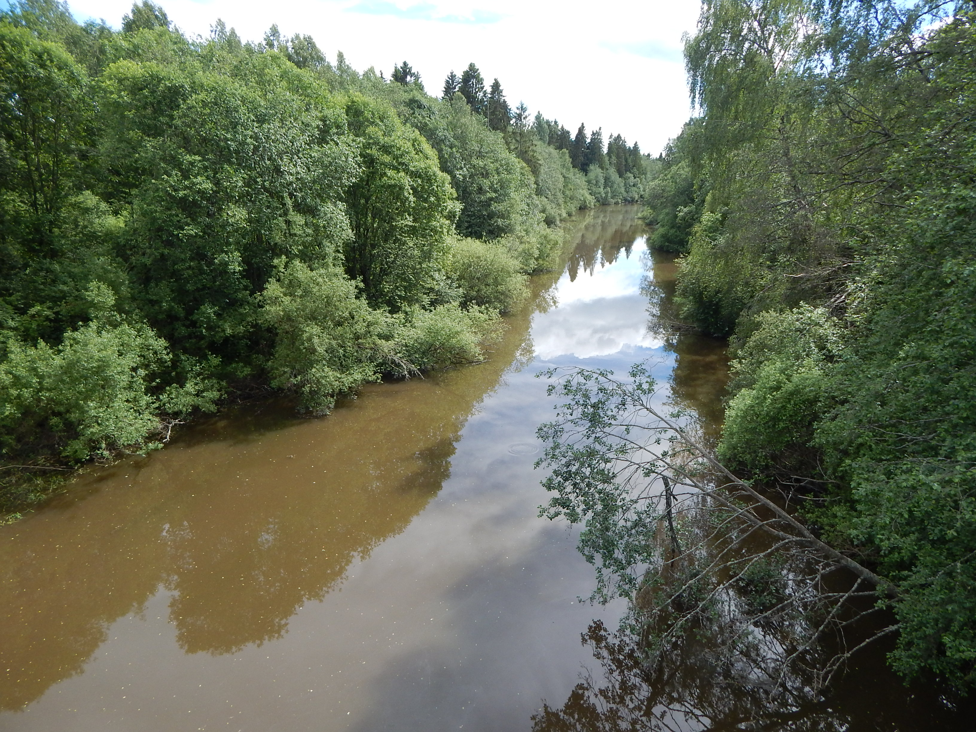 Rømua nedstrøms fra Nordli bru, like utenfor Lørenfallet